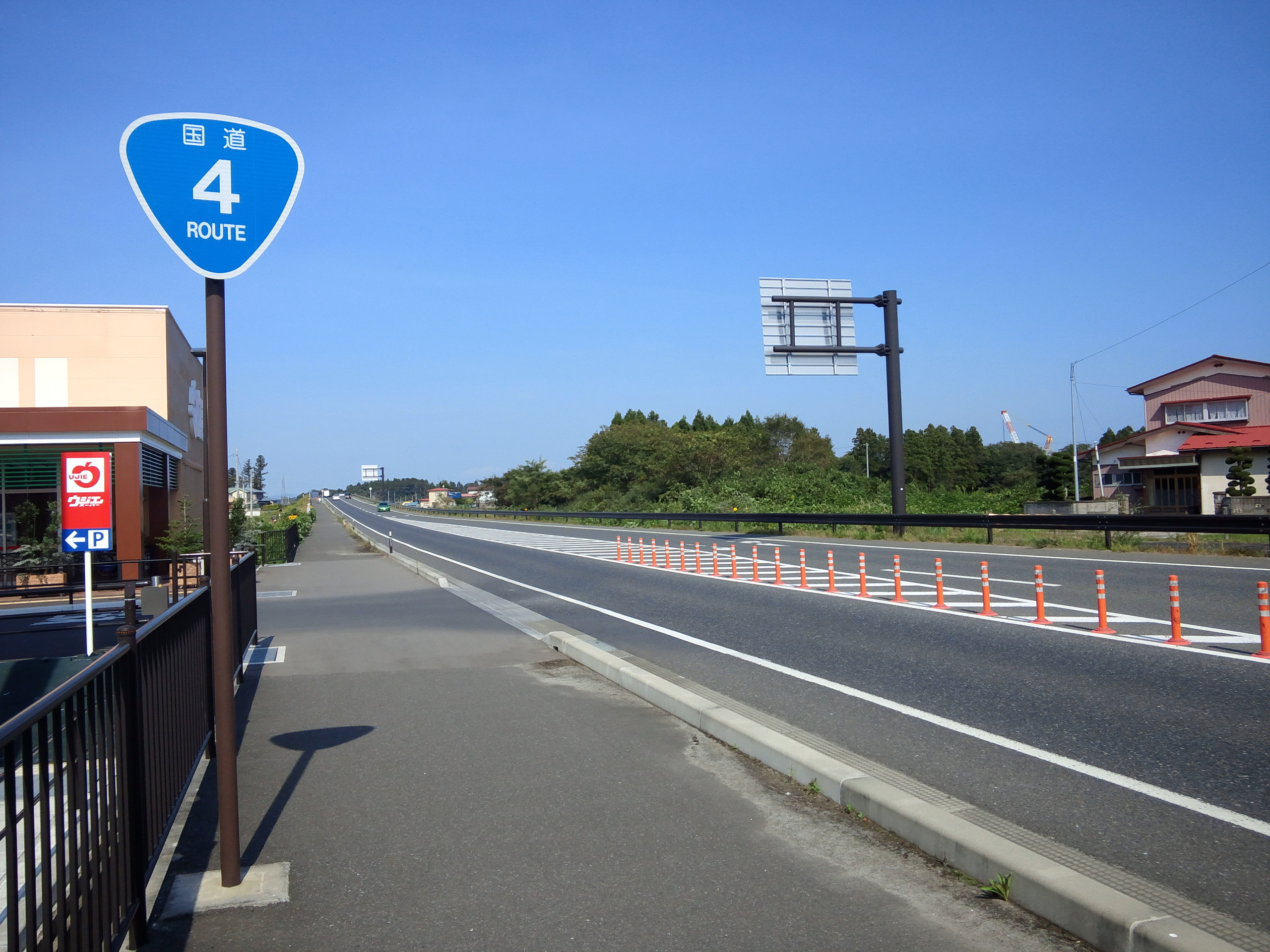 国道4号線築館バイパス 宮城県栗原市築館源光付近（志波姫方面側を撮影）